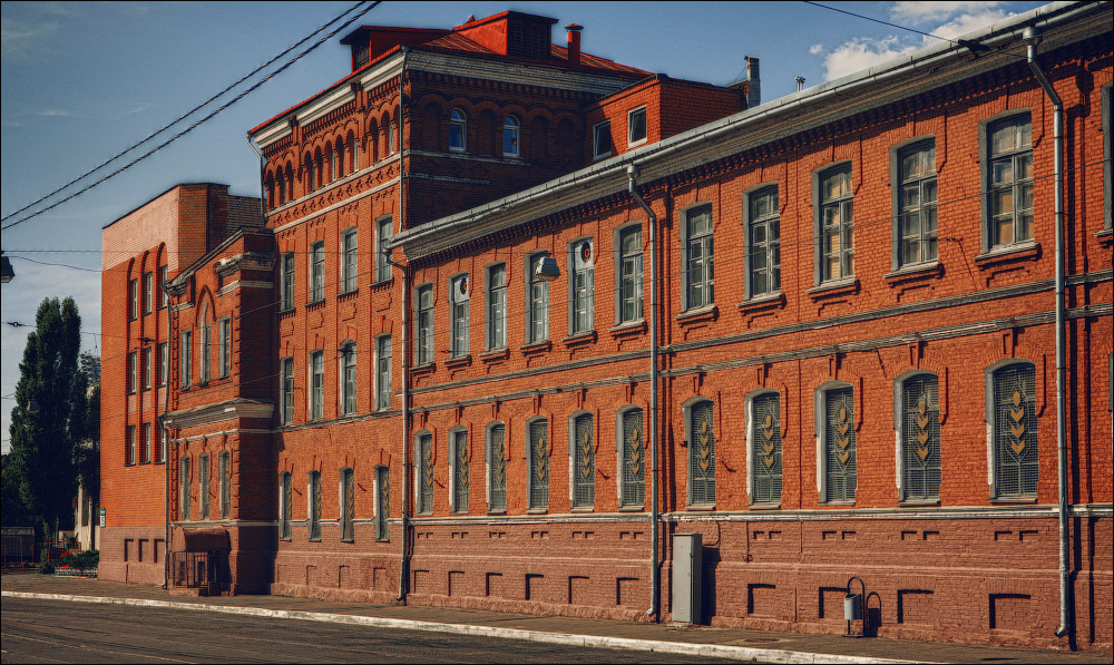 Замалёўкі Мінска